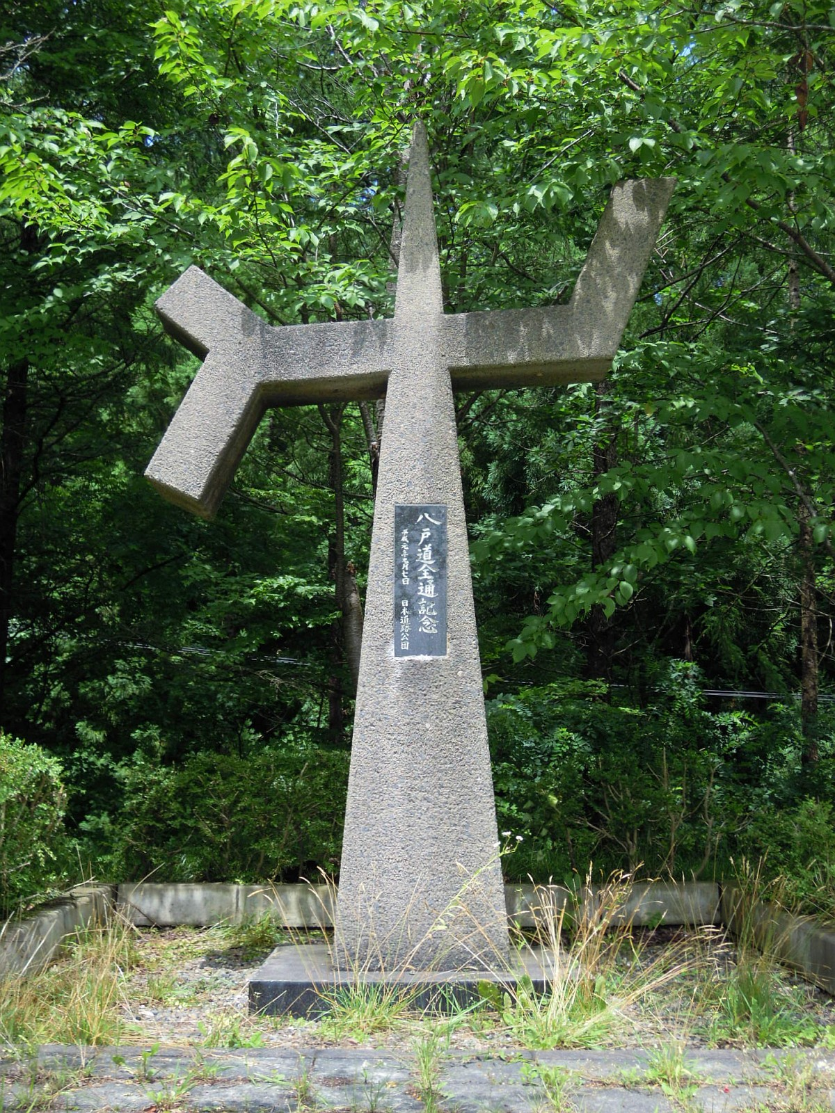 岩手県二戸市の八戸自動車道二戸パーキングエリア（下り線）にある八戸自動車道全通記念碑